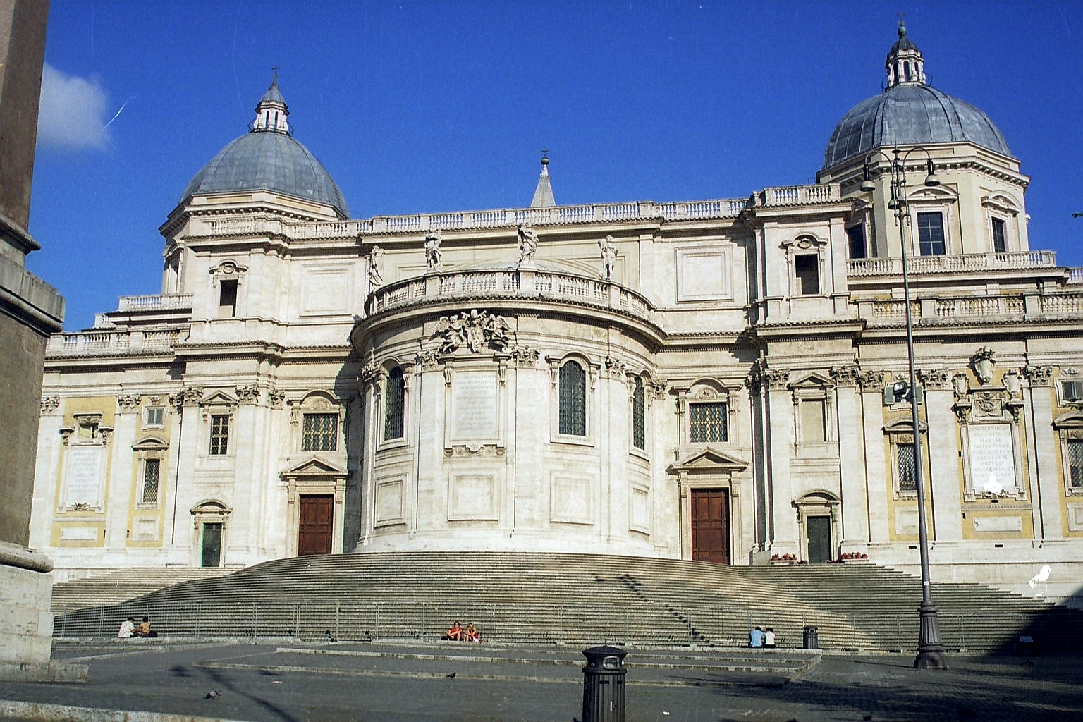 Apse of Santa Maria Maggiore (Rome)